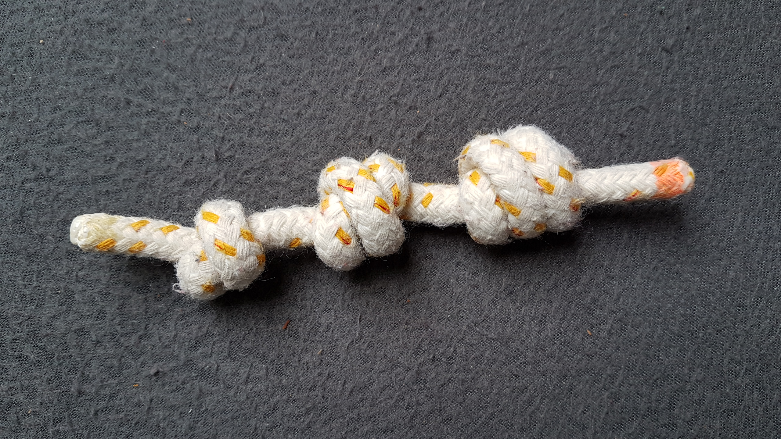 Beispiele von Überhandknoten mit unterschiedlicher Anzahl der Windungen